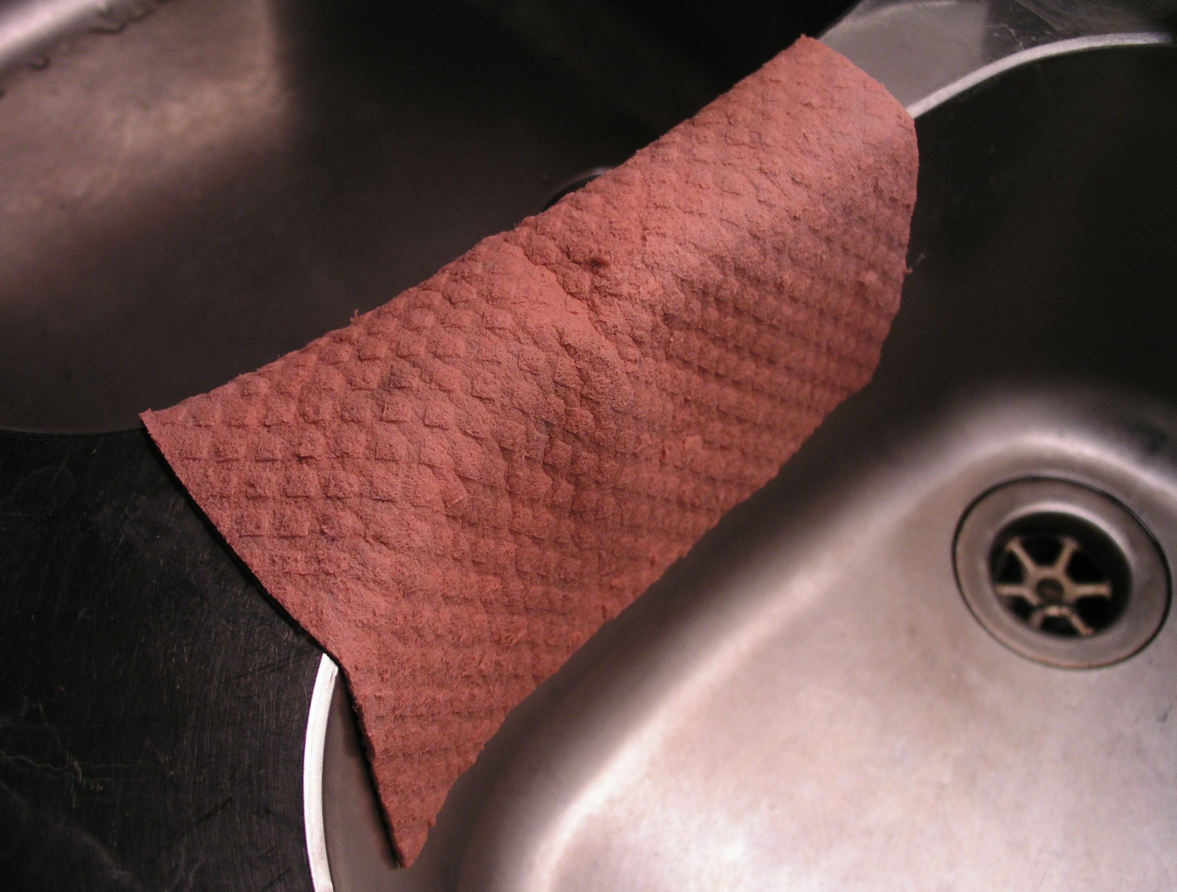 Tør karklud